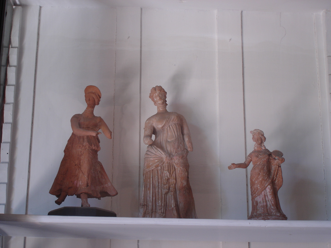 Istanbul - Museo archeologico - Figurine in terracotta di donne. Arte ellenistica, secc. III-I a.C. - Foto di: Giovanni Dall'Orto 28-5-2006.